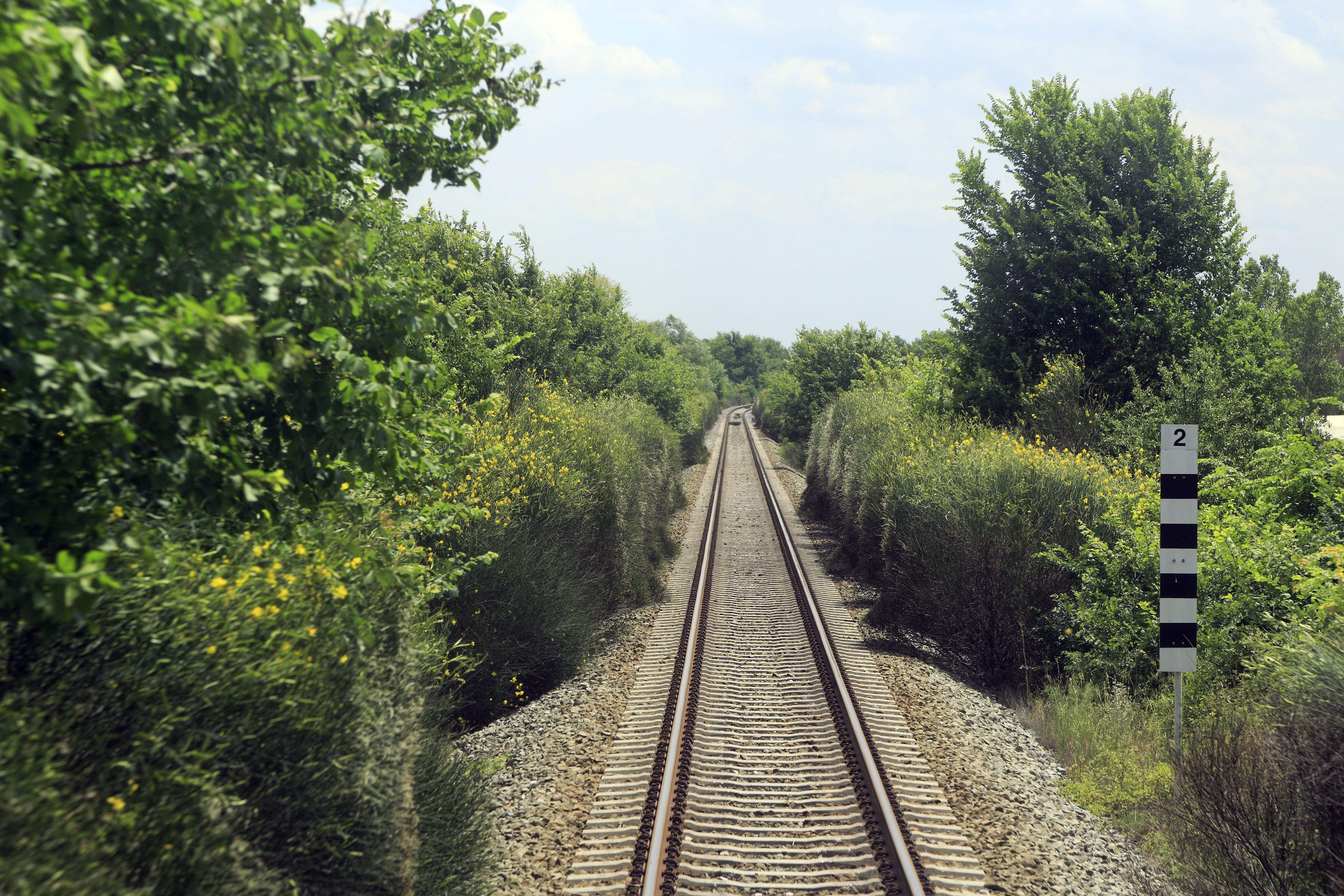 Vegetationsschnitt passiert kaum, die Spitzen werden nur durch die fahrenden Züge kurzgehalten. Auch im Gleis siedeln sich Pflanzen an.